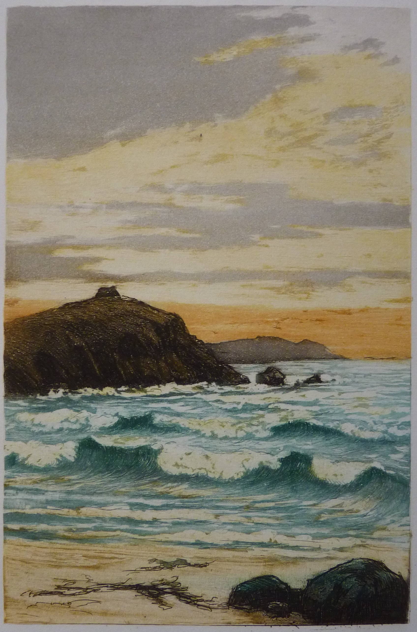 Fontispice du livre Par les champs et par les grèves, de Gustave Flaubert, Paris, Carteret, 1931